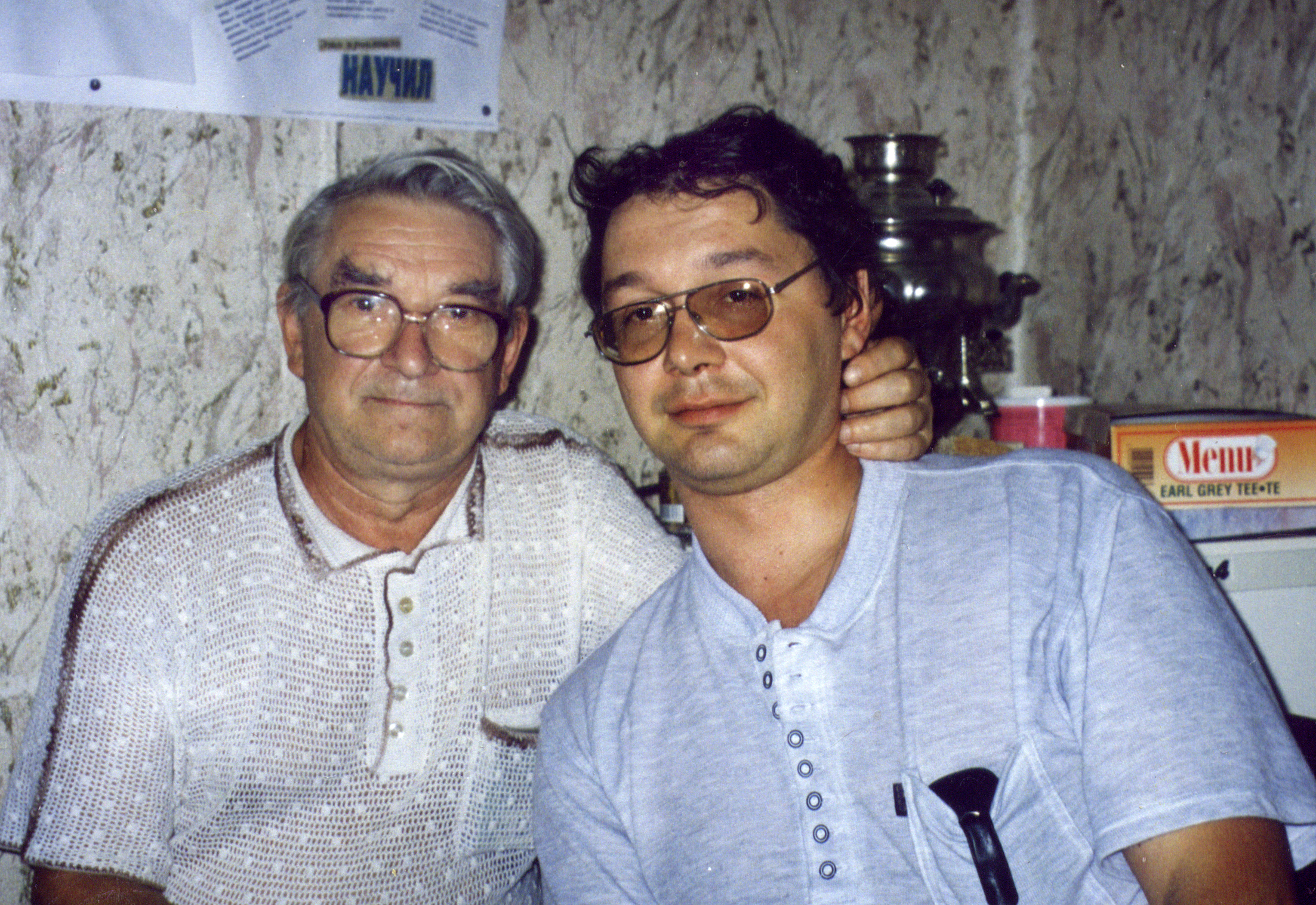 Профессор кафедры пропедевтики детских болезней СПбГПМА В. В. Юрьев и профессор М. М. Хомич